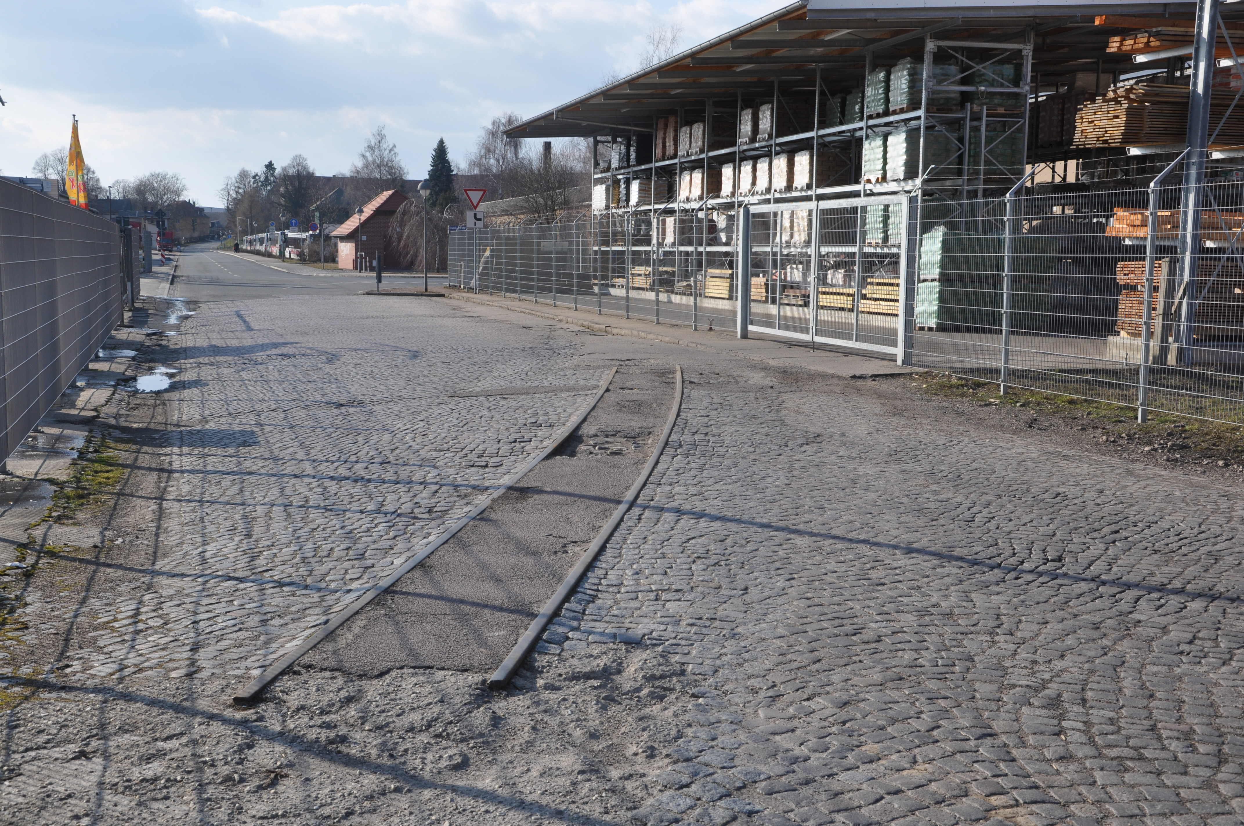 Bahnhof Lommatzsch, Gleis der früheren Schmalspurbahn